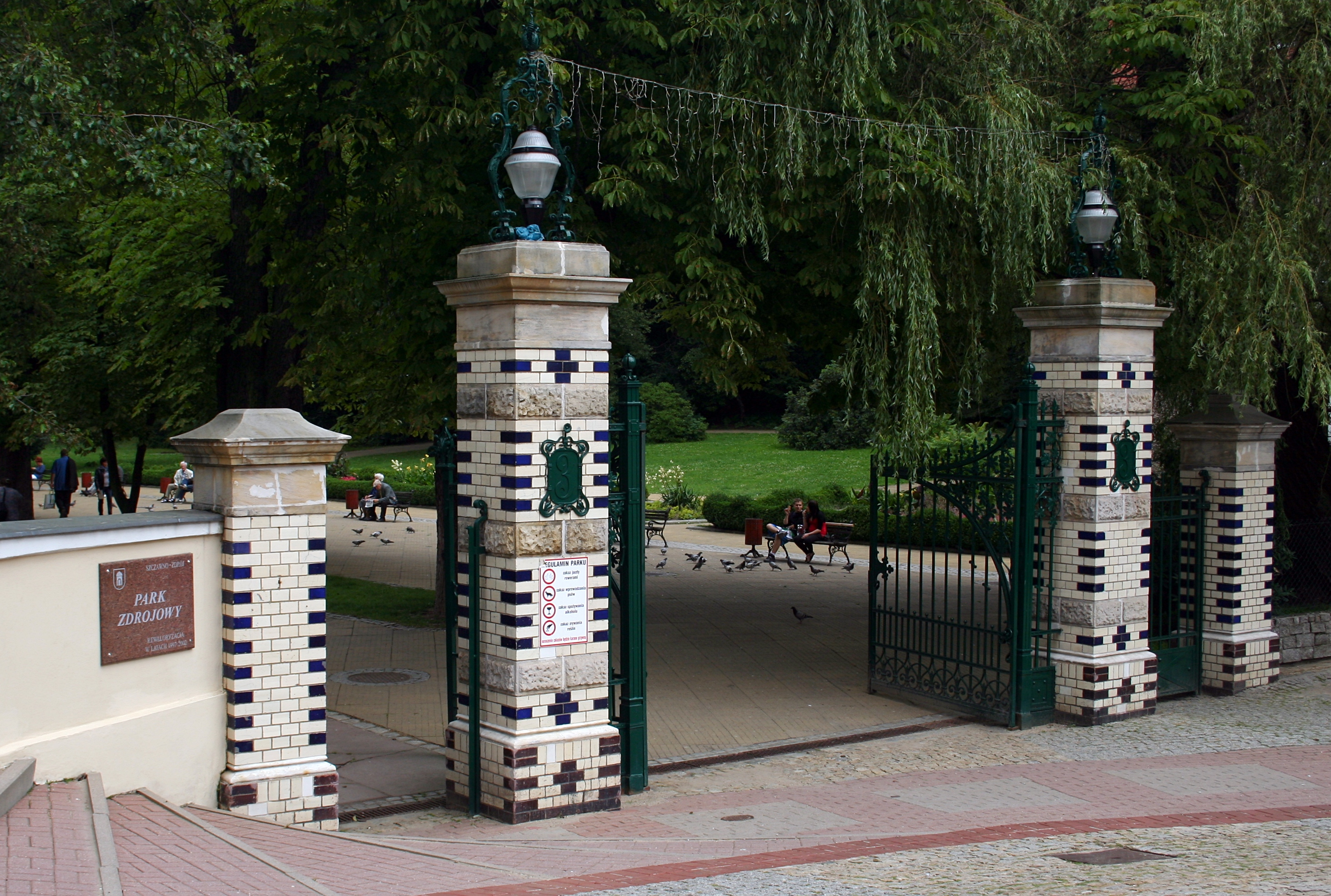 Brama Parku Zdrojowego w Szczawnie-Zdroju